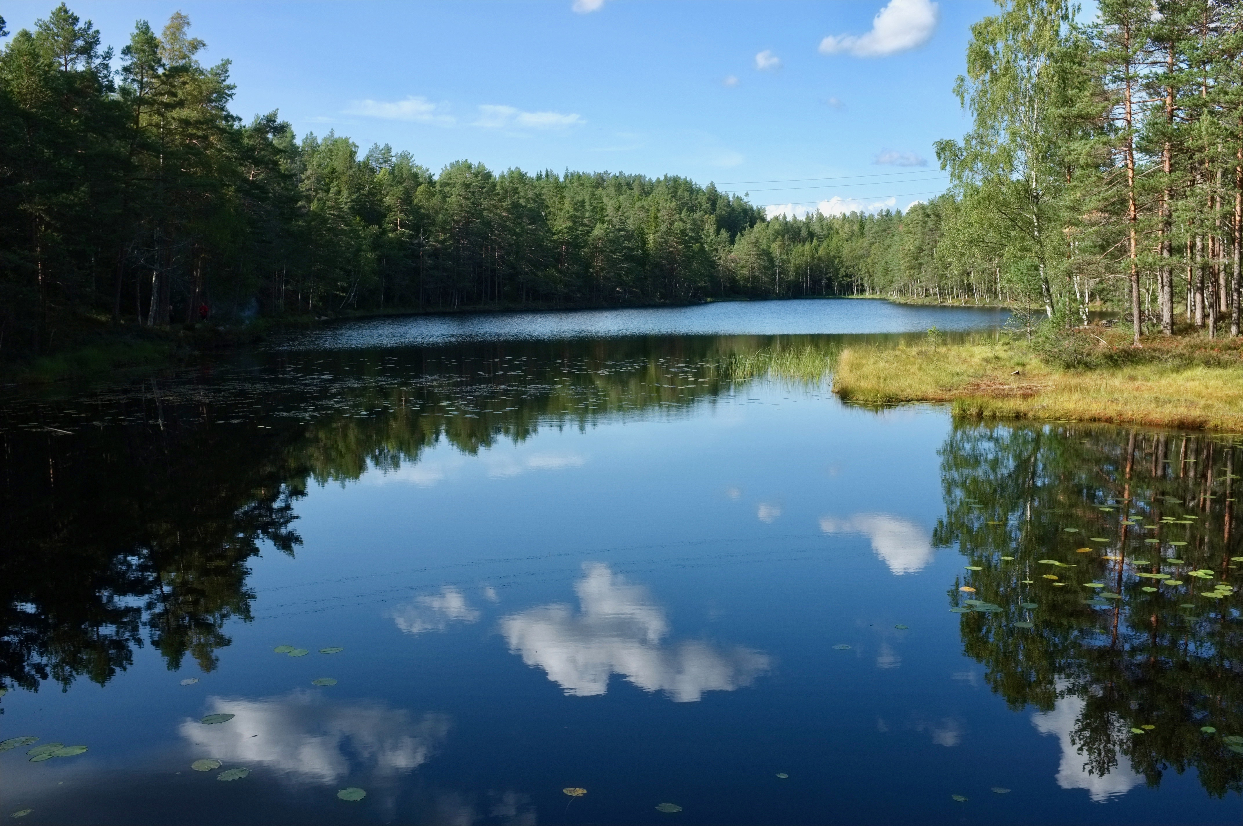 Smalvann i Østmarka i Oslo.